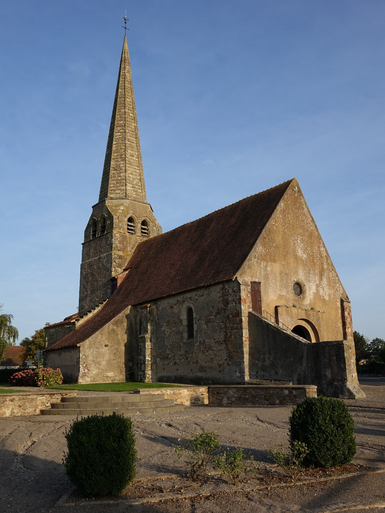 Église Saint-Martin